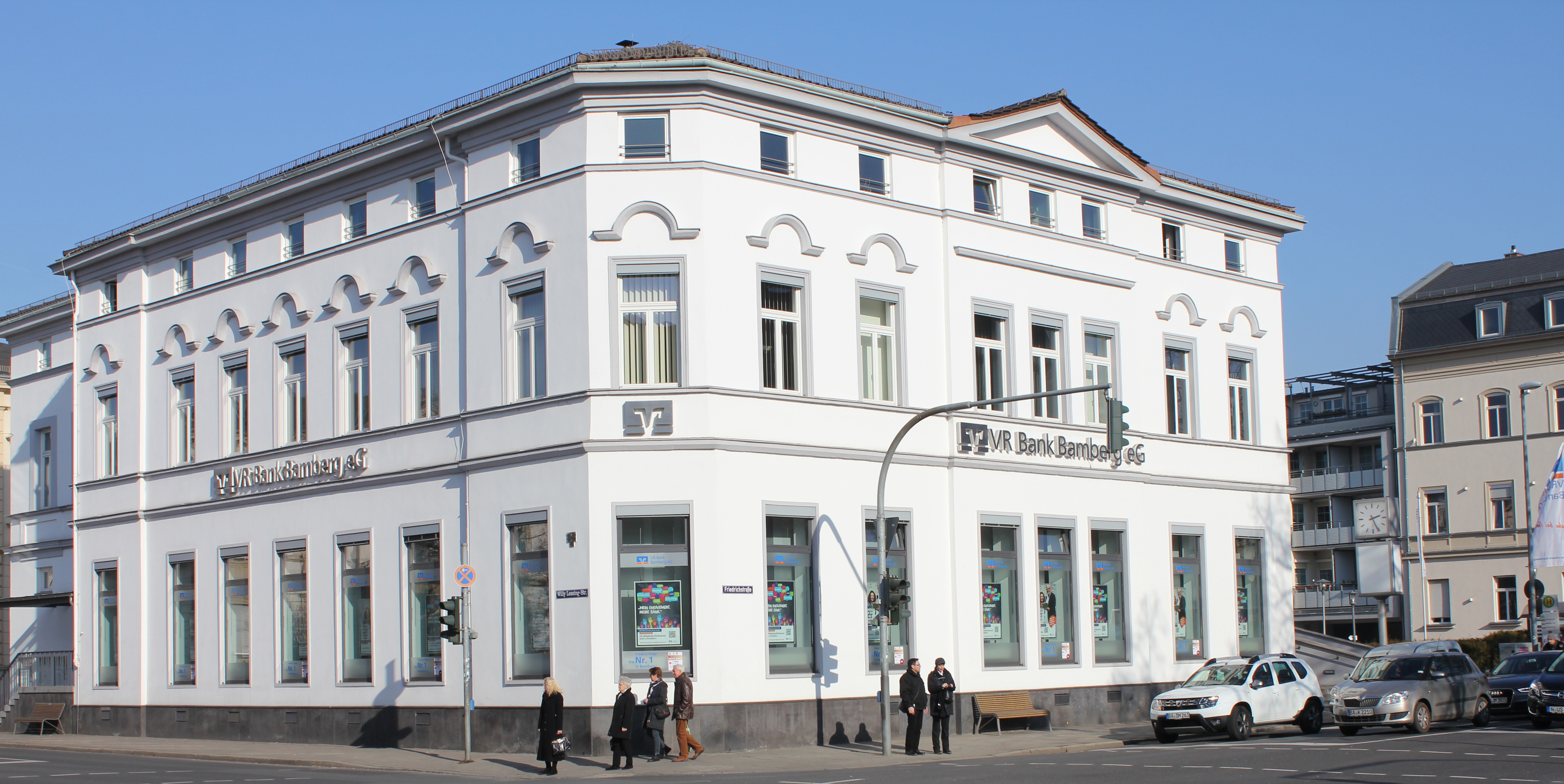 Kundenzentrum in der Willy-Lessing-Str. 2